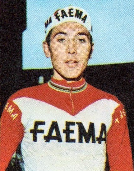 Eddy Merckx en 1969, 'Campioni dello Sport 1969 - 1970', Panini figurina n°182.